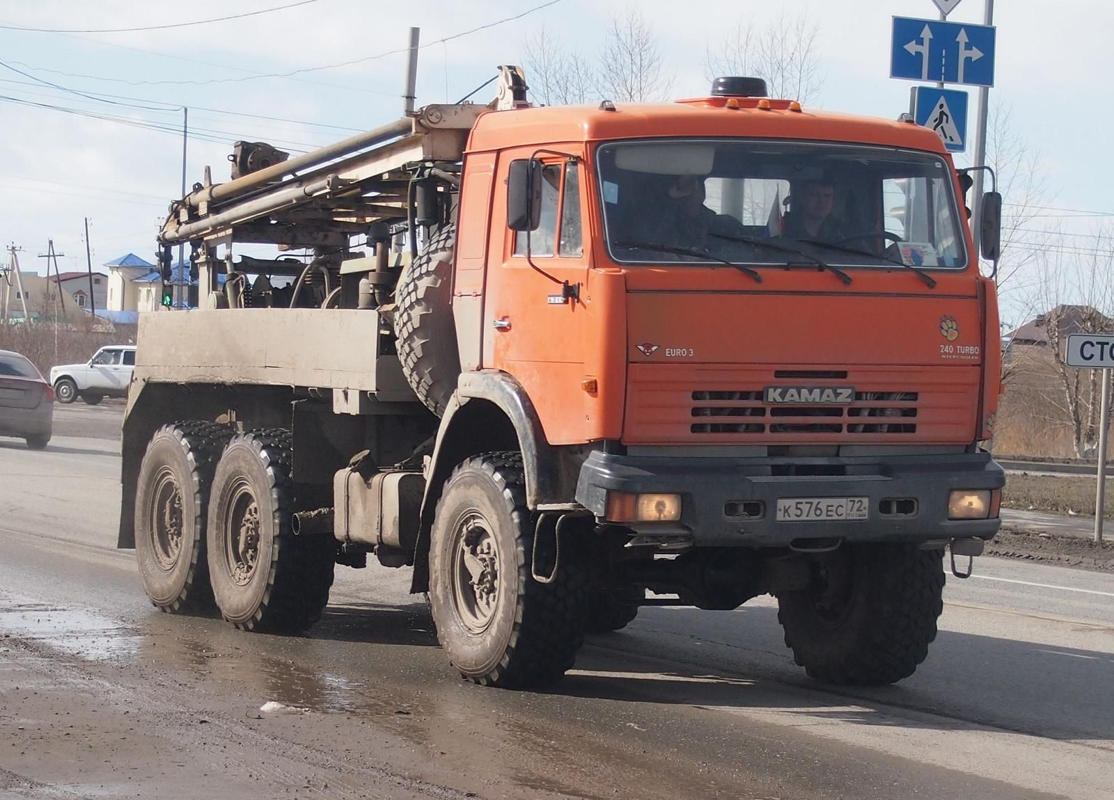 Буровая установка ПБУ-2 на КАМАЗе-43114, Тюмень